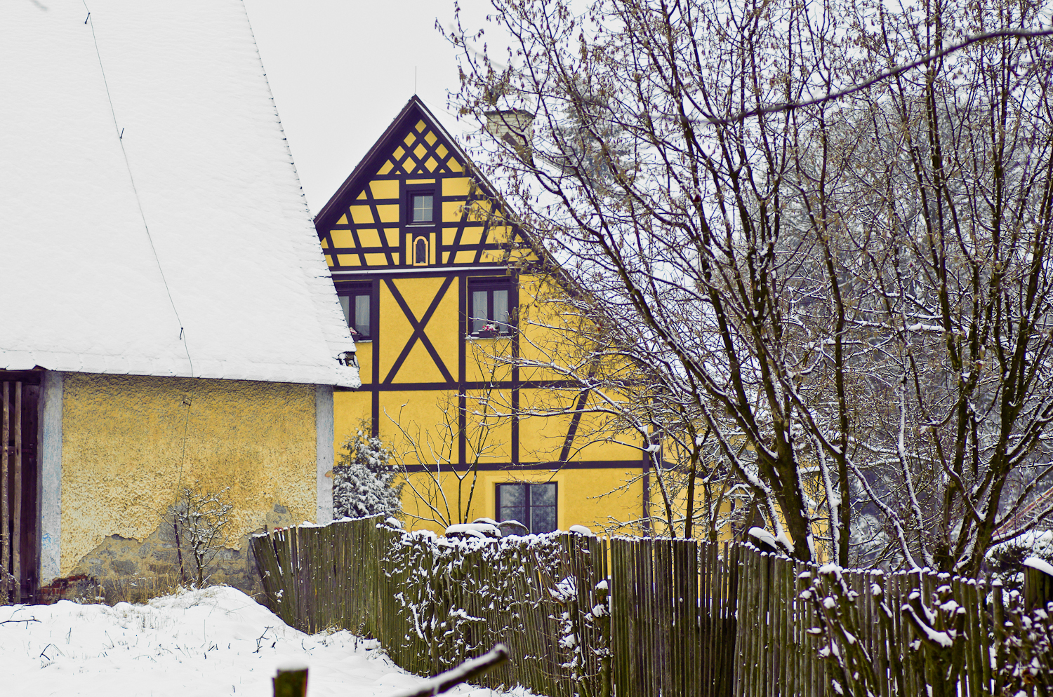 Horní Rozmyšl, okres Sokolov, hrázděný dům